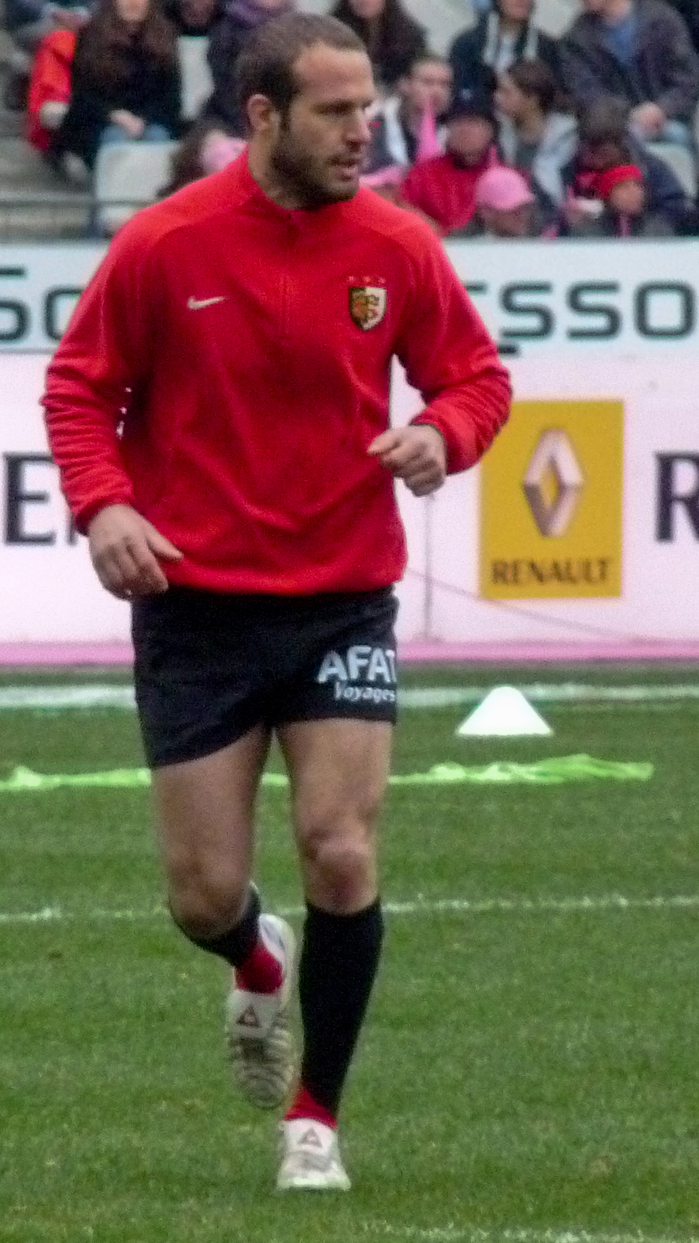 Frédéric Michalak à l'entrainement avant Stade français vs Stade toulousain le 6 mars 2010.